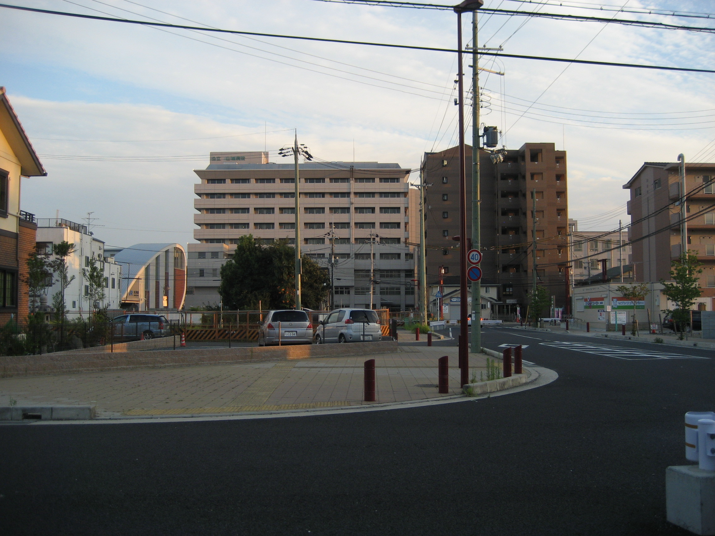 Kizu